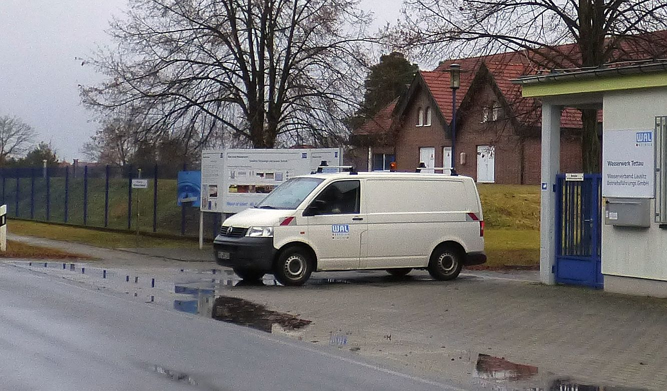 Transporter am Wasserwerk Tettau